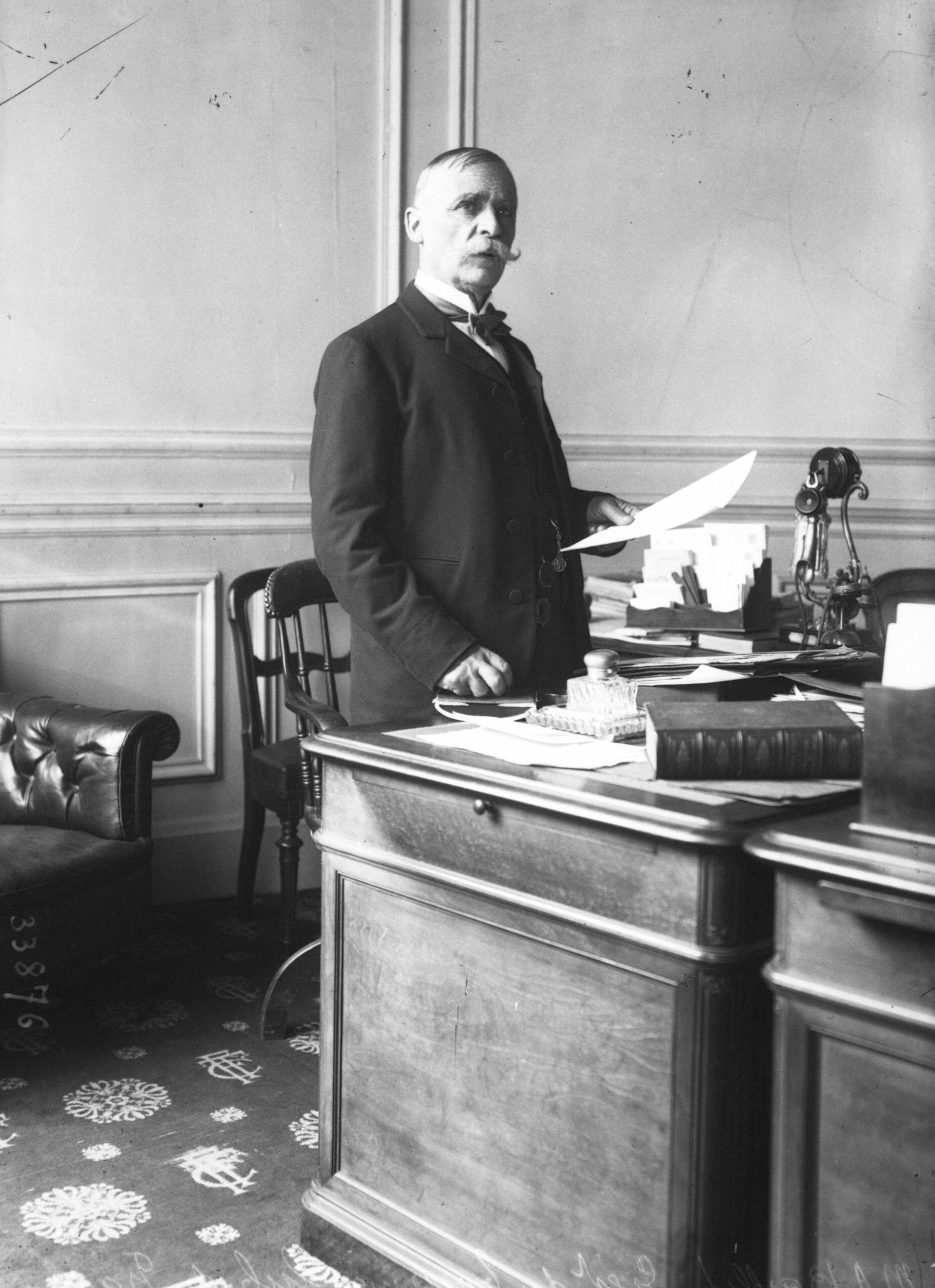 Photo en noir et blanc d'Abel Ballif, président du Touring Club de France, en costume debout derrière son à son bureau en 1913 par l'agence Rol. Il tient un papier à la main et paraît être surprit en plein travail